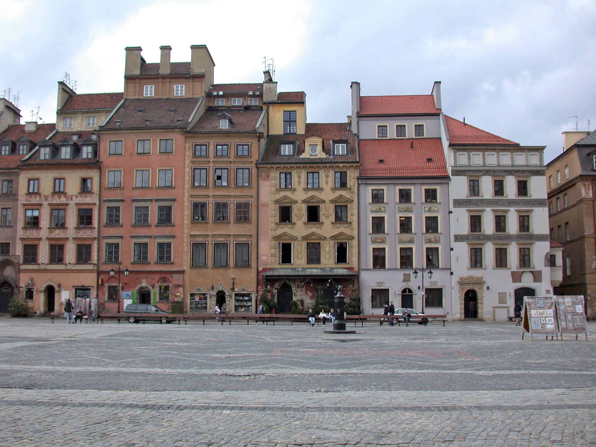 Varsavia, Piazza del Mercato della Città Vecchia (Rynek Starego Miasta), lato Kołłataj (sudoccidentale), case dalla quinta alla decima e ultima da sinistra: l'ottava è la casa Fukier, ramo polacco dei Fugger; la decima e ultima è la casa di Sant'Anna con la statua della santa sull'angolo.